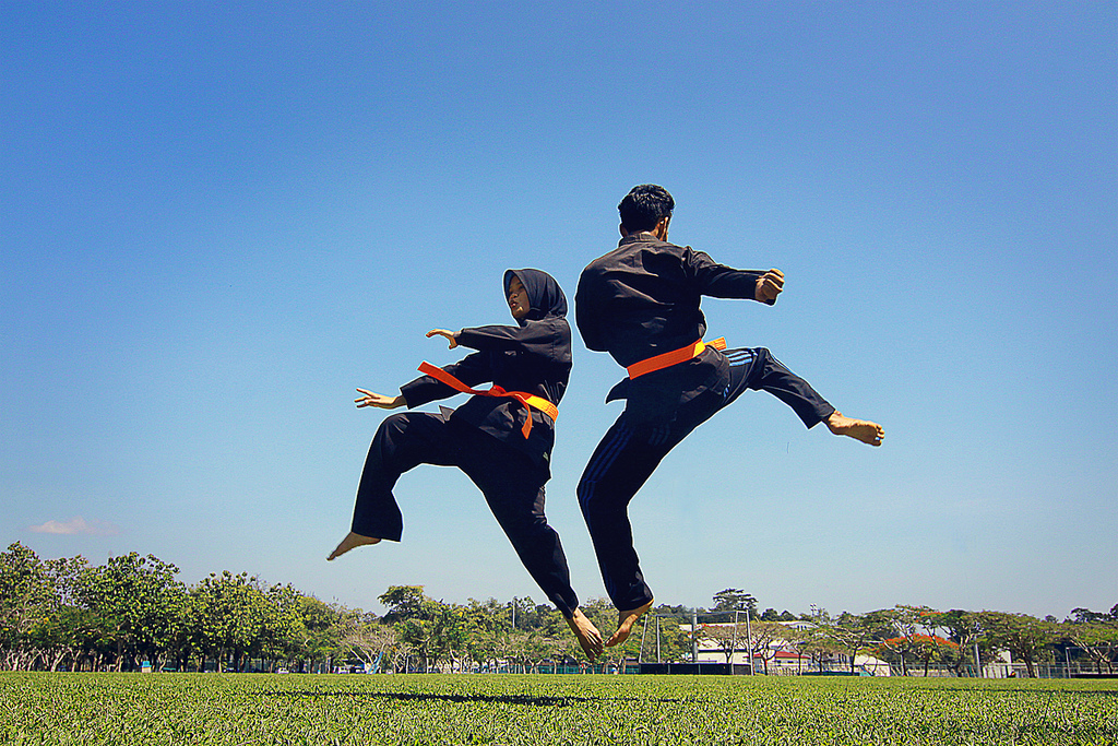 Seni Silat Melayu